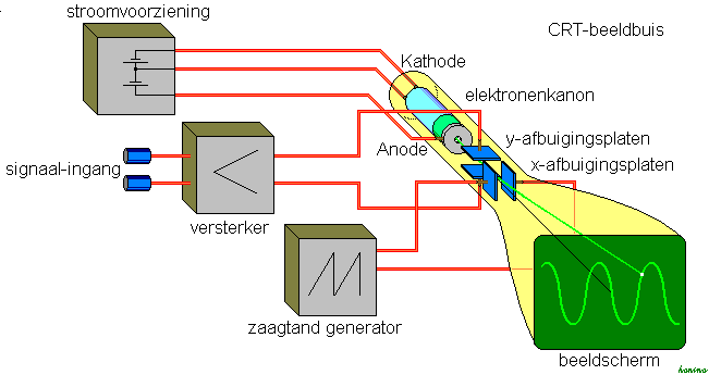 Schema van werking oscilloscoop, van duitse wiki, door gebruiker Honina, met duidelijke GFDL vermelding.